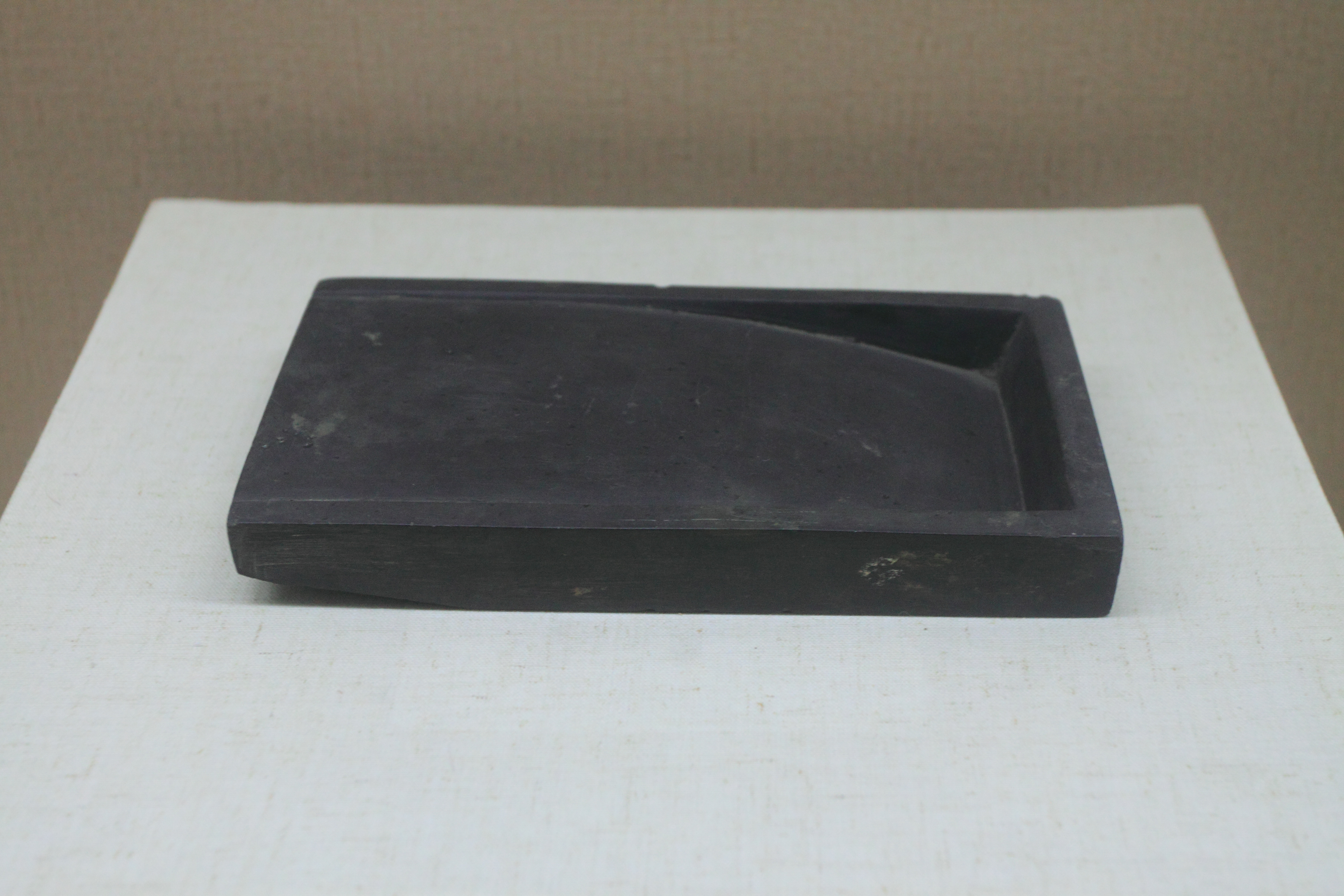 江西省博物馆（位于中国江西省南昌市）藏品——抄手砚，宋，1970年南丰县莱溪公社曾巩墓出土